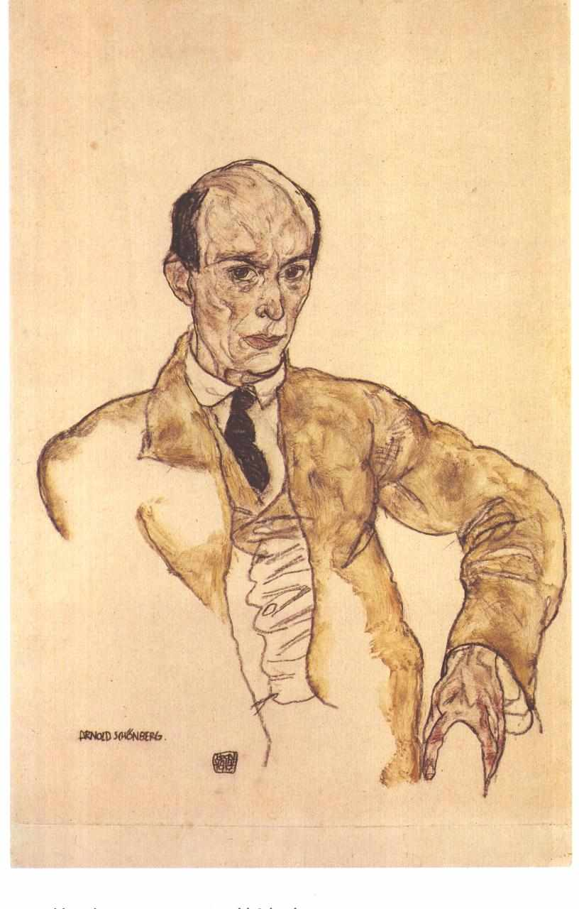 composer